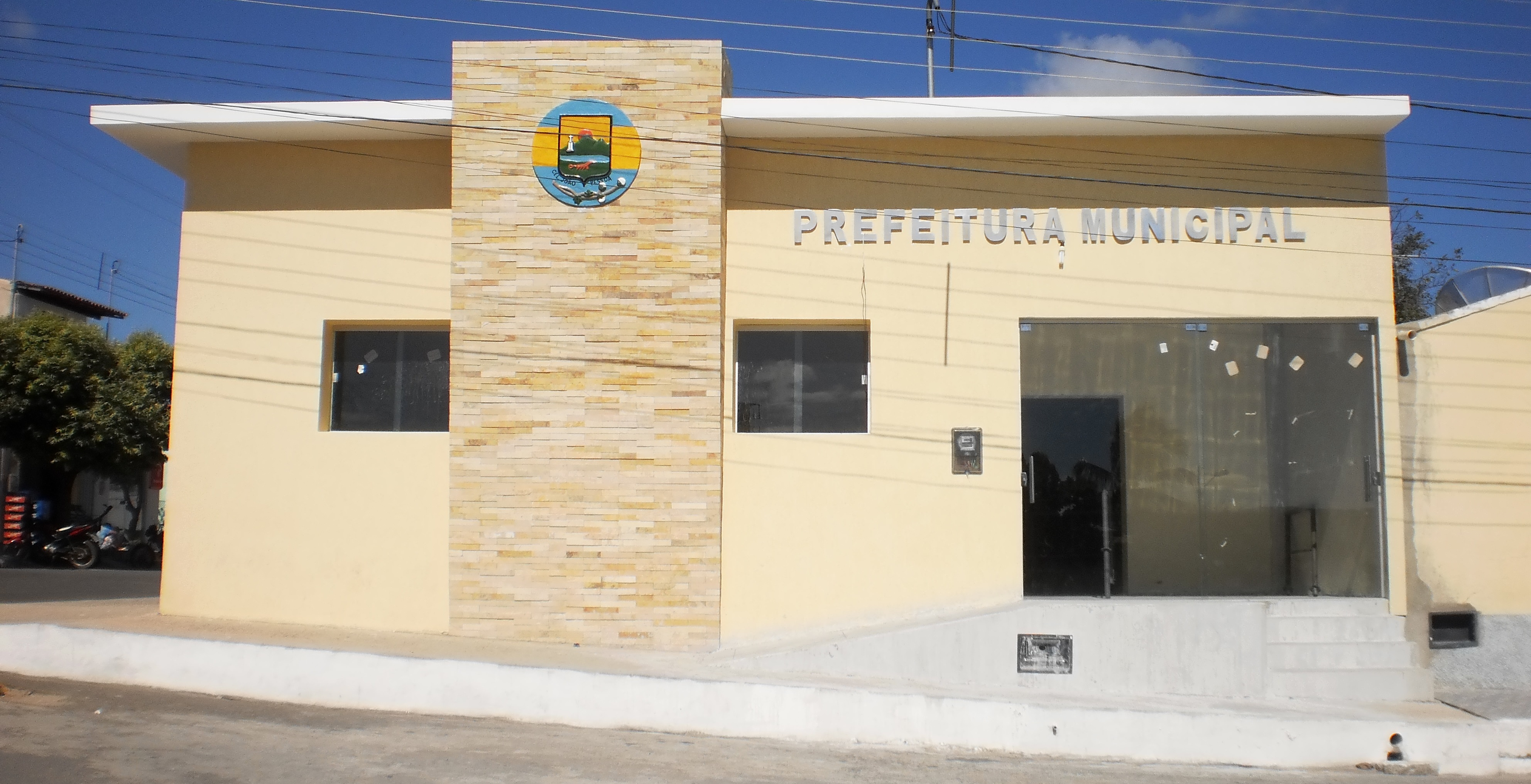 Prefeitura Municipal de Coronel João Pessoa, Rio Grande do Norte, Brasil.